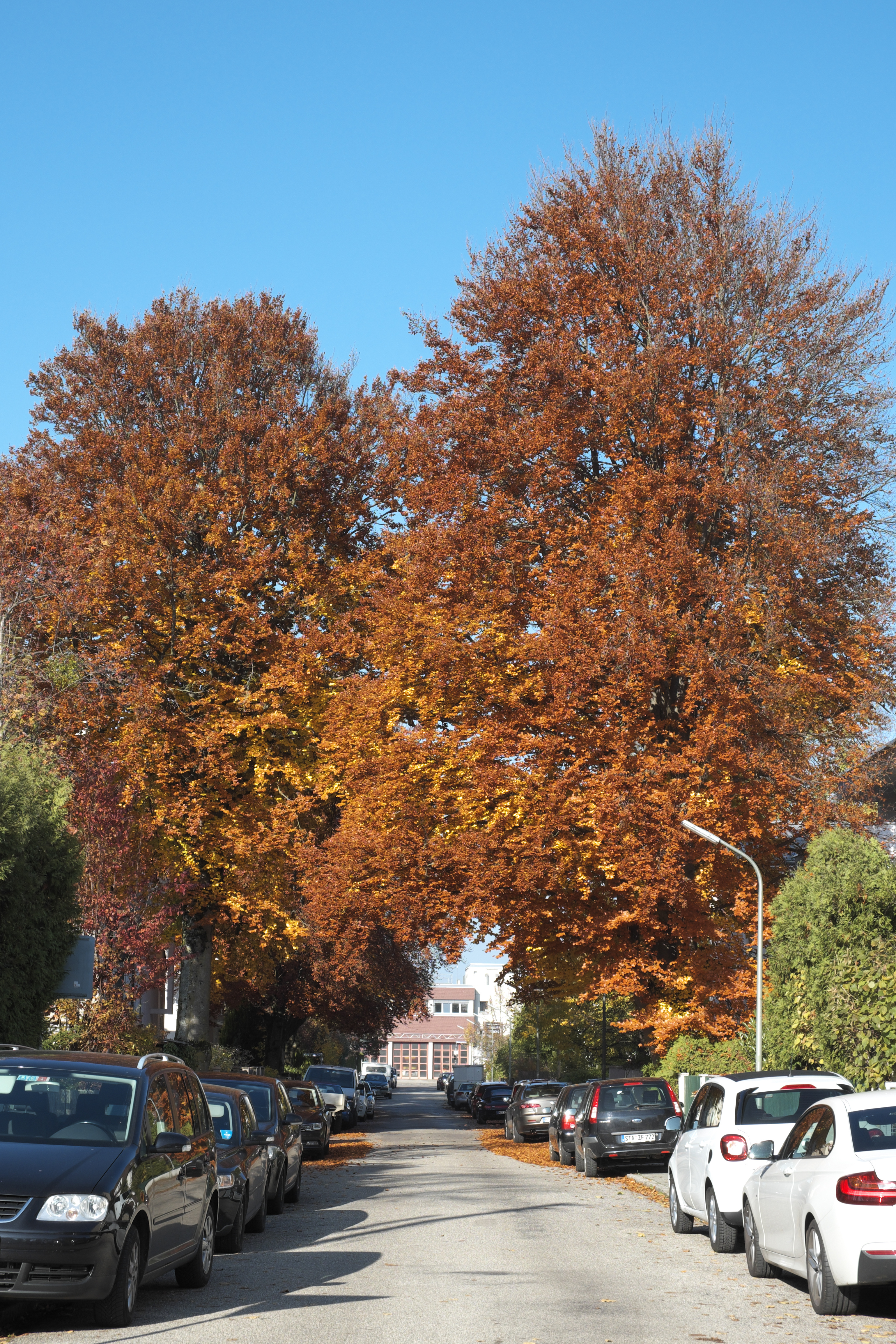 Barystraße in Obermenzing im Stadtbezirk Pasing-Obermenzing in München (Bayern/Deutschland), benannt nach Alfred von Bary; der große Baum rechts wurde im Herbst 2016 gefällt